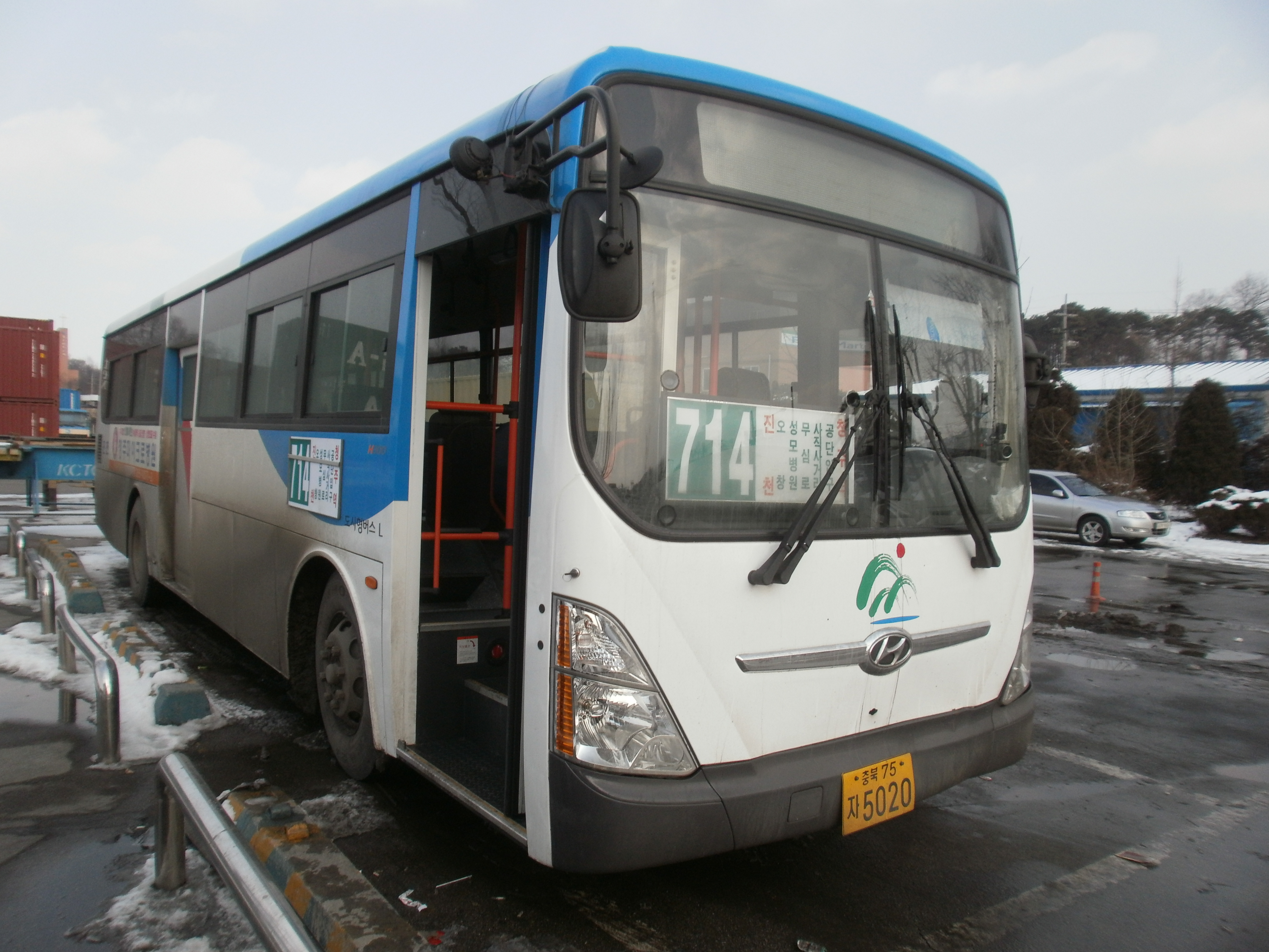 청주역에 대기중인 진천여객 뉴 슈퍼 에어로시티